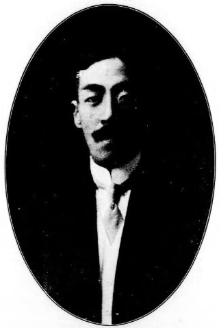 横山隆俊男爵（1876～1933）